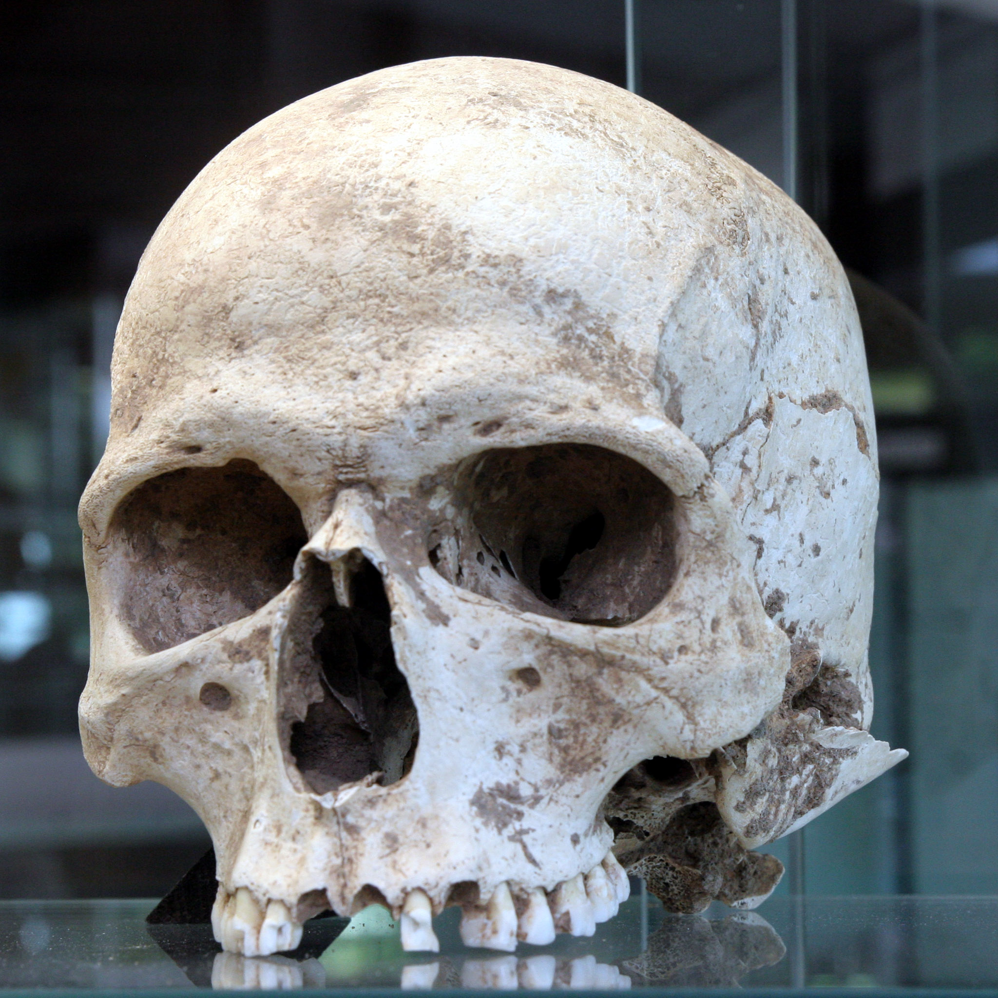 Schädel aus der Jungsteinzeit (5000 v. Chr.), aus dem Fund in Herxheim bei Landau/Pfalz. Der Schädel befindet sich im Museum des Institutes für Geowissenschaften an der Ruprecht-Karls-Universität in Heidelberg (Im Neuenheimer Feld 234) [1]